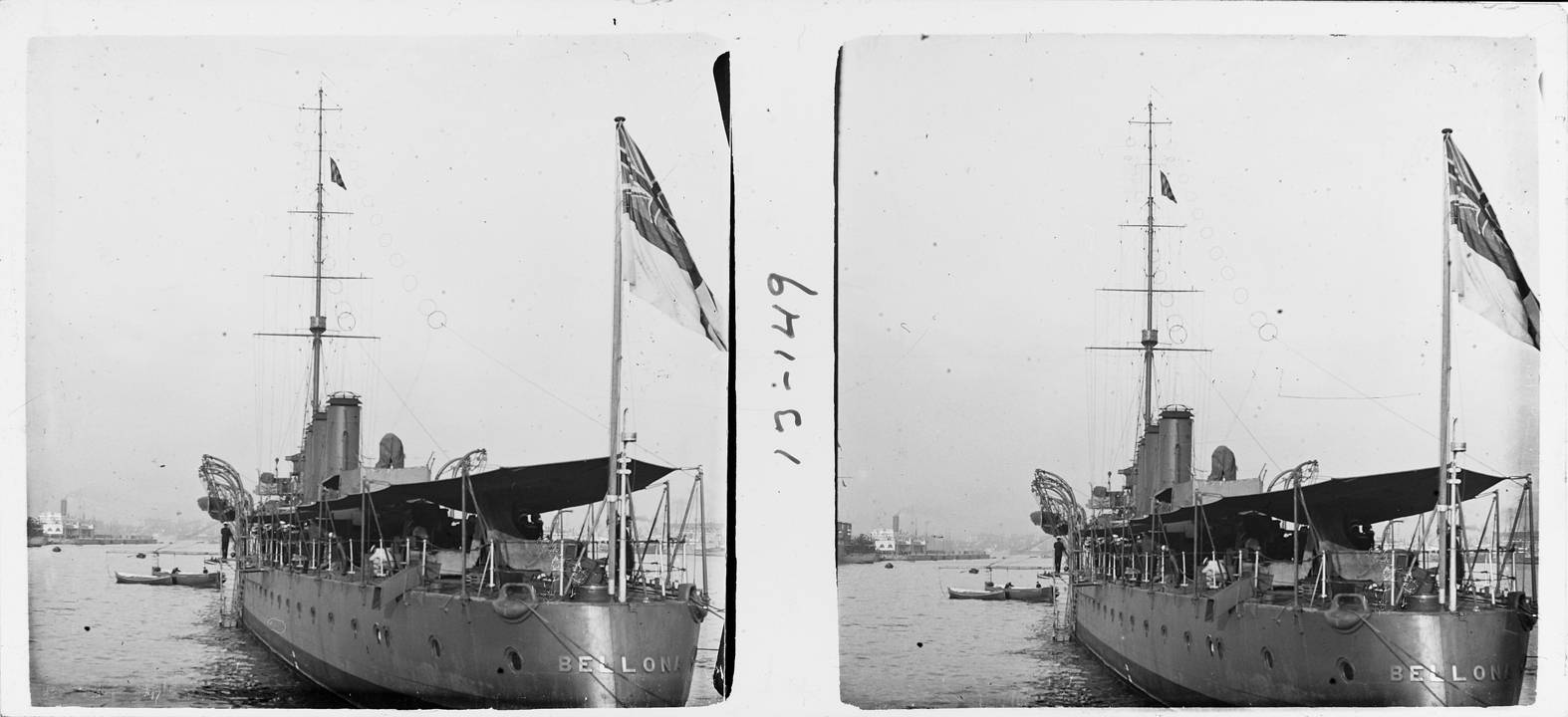 Vista del vaixell Bellona (pertany a l'Armada anglesa)